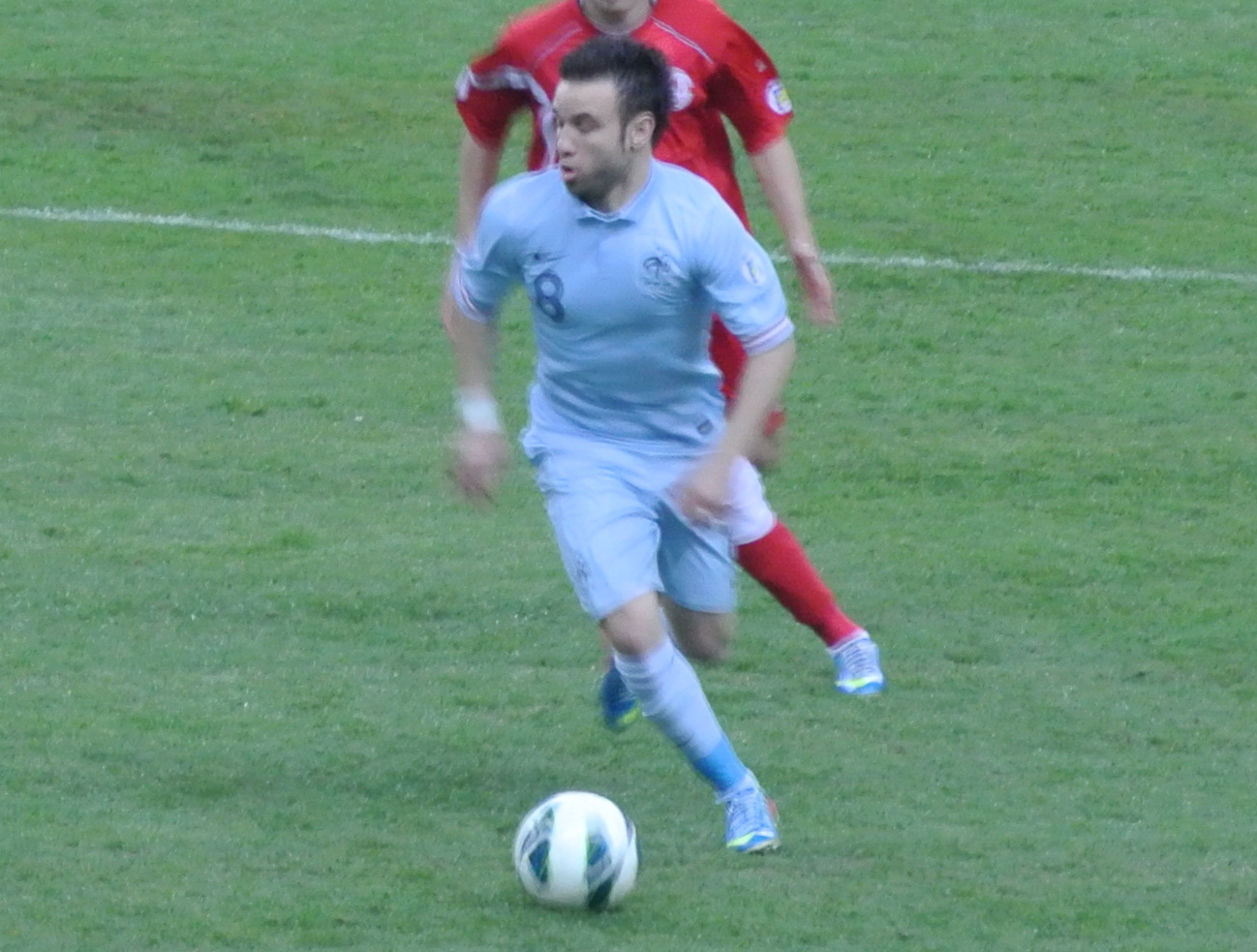 Valbuena en équipe de France jouant contre la Géorgie, le 22 mars 2013